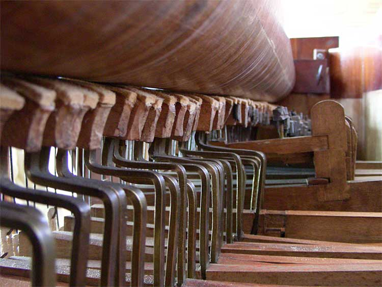 Terpodion Innenansicht Johann David Buschmann (1773-1852) Um 1825 Berlin Signatur „J.D. Buschmann in Berlin“ Klaviaturumfang: F2-f4 (sechs Oktaven) Restaurierung 2006 / 07: Andreas Hermert / Meike Wolters H 830 mm, B 1296 mm, T 666 mm Inv.-Nr.: V/J 417